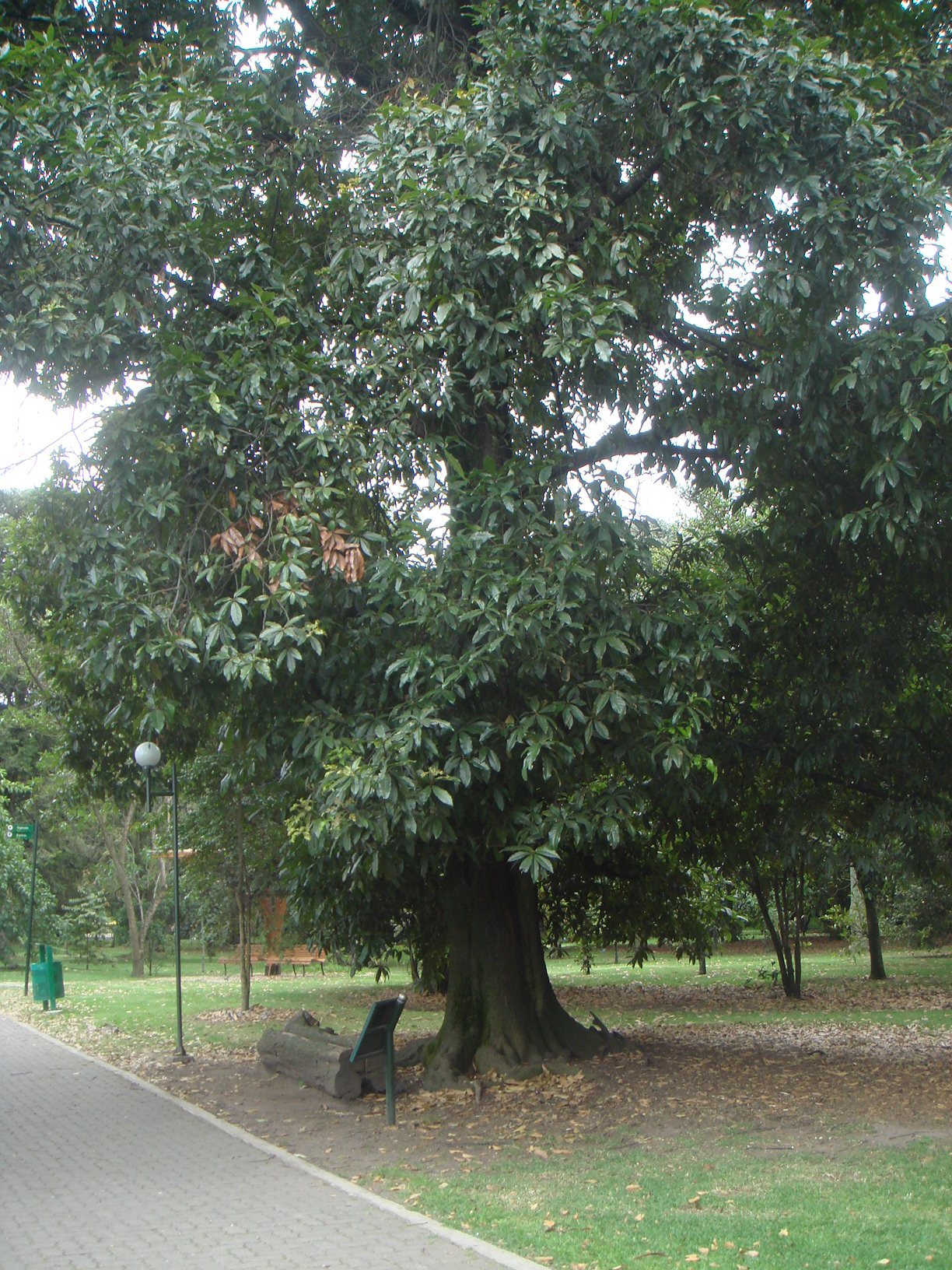 Roble colombiano (Quercus humboldtii) Jardín Botánico de Bogotá.